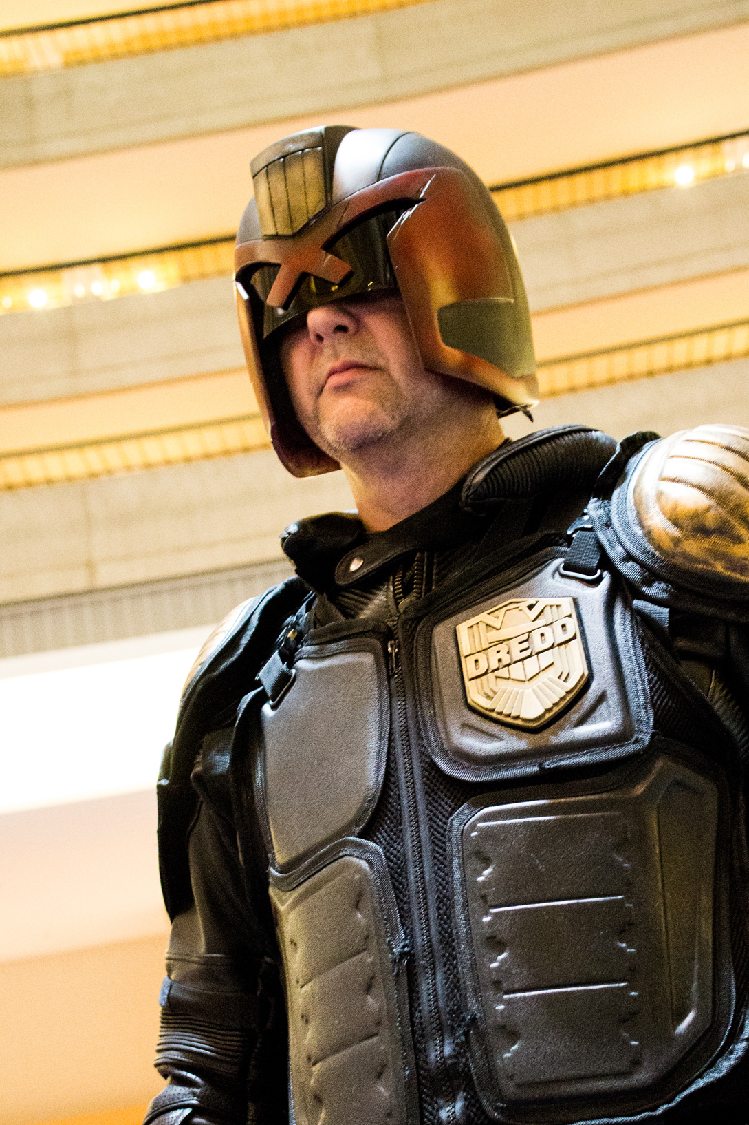 Cosplay at Dragon*Con 2013.